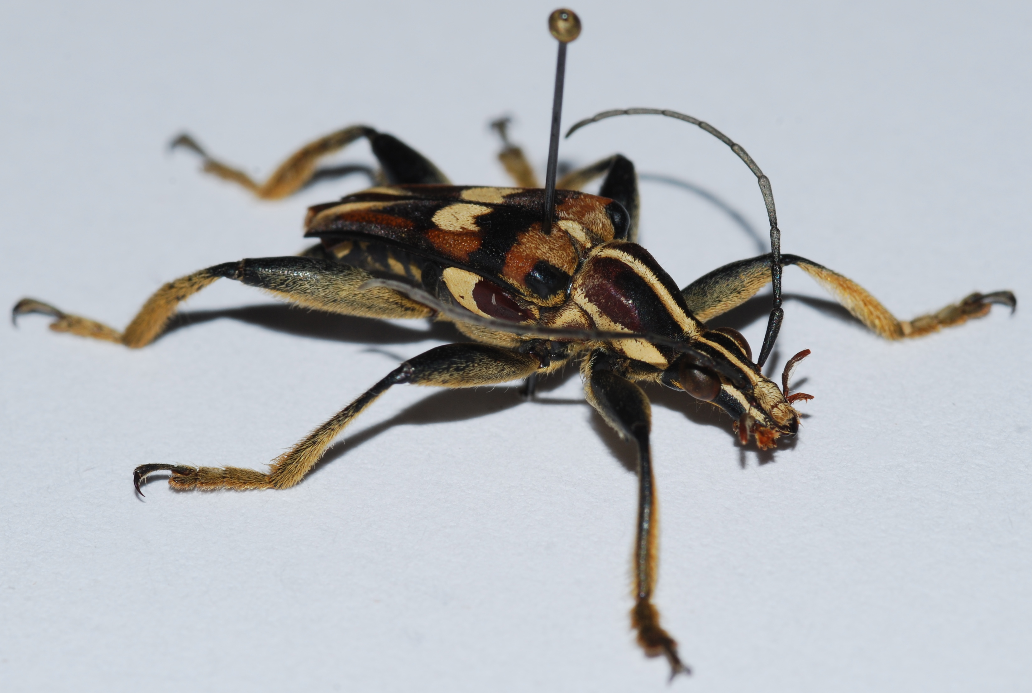 Beparasy, MADAGASCAR